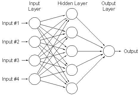 User:Joerite